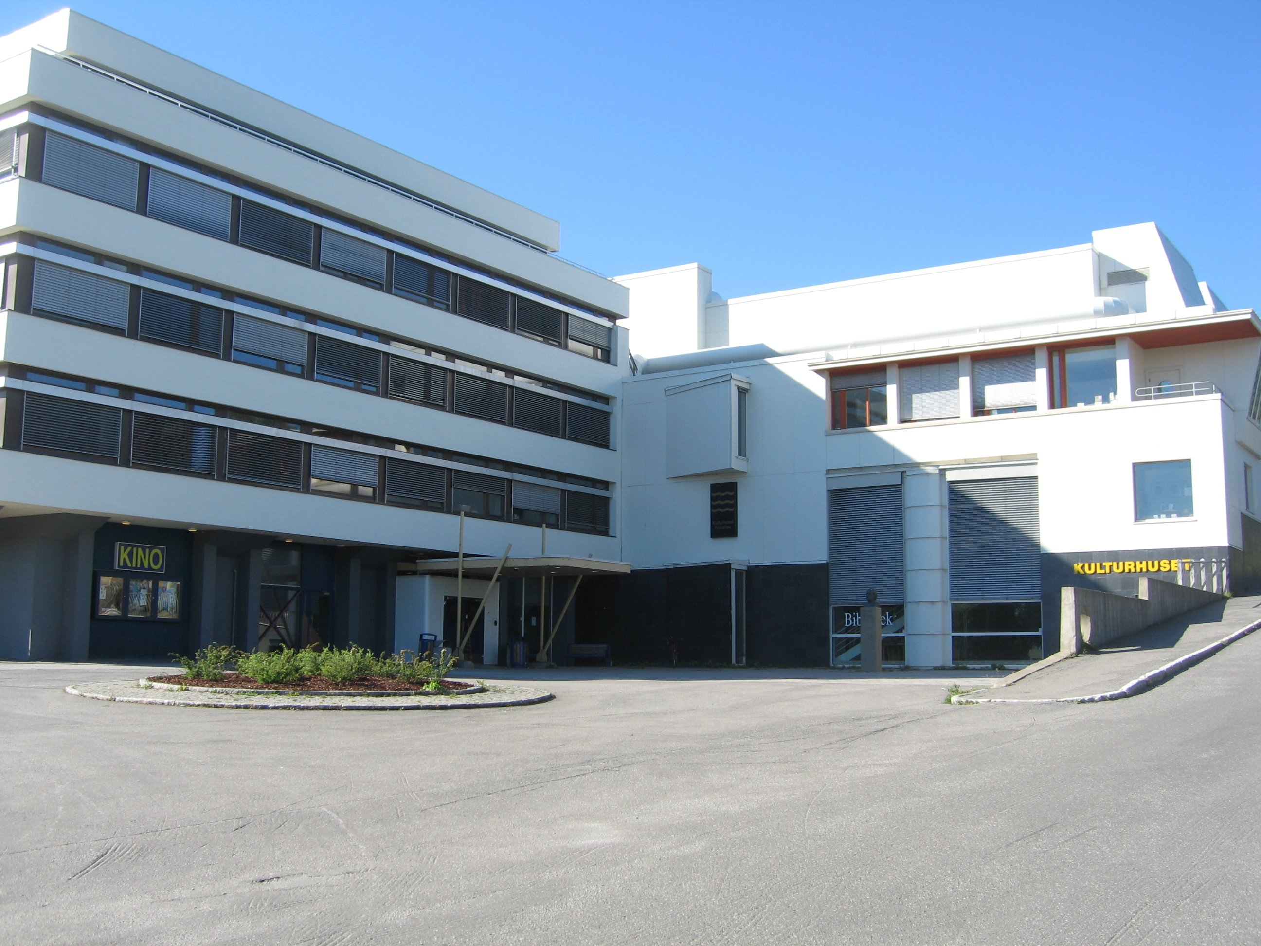 Arvid Hanssens Plass, Finnsnes